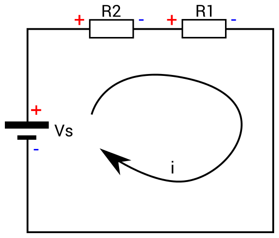 Näide Kirchhoffi II. seadusest. Kõikide kinnise kontuuri pingete summa on null.